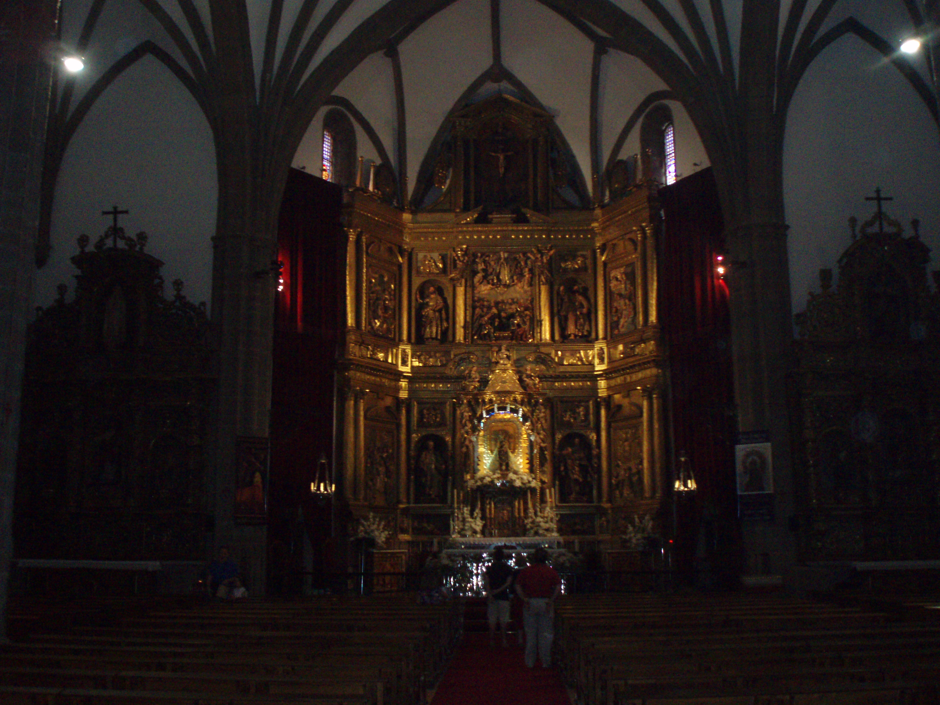 Vista general del interior de la Basílica de la Virgen de la Encina de Ponferrada.